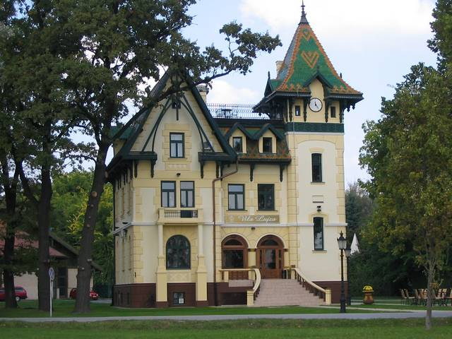 Palić